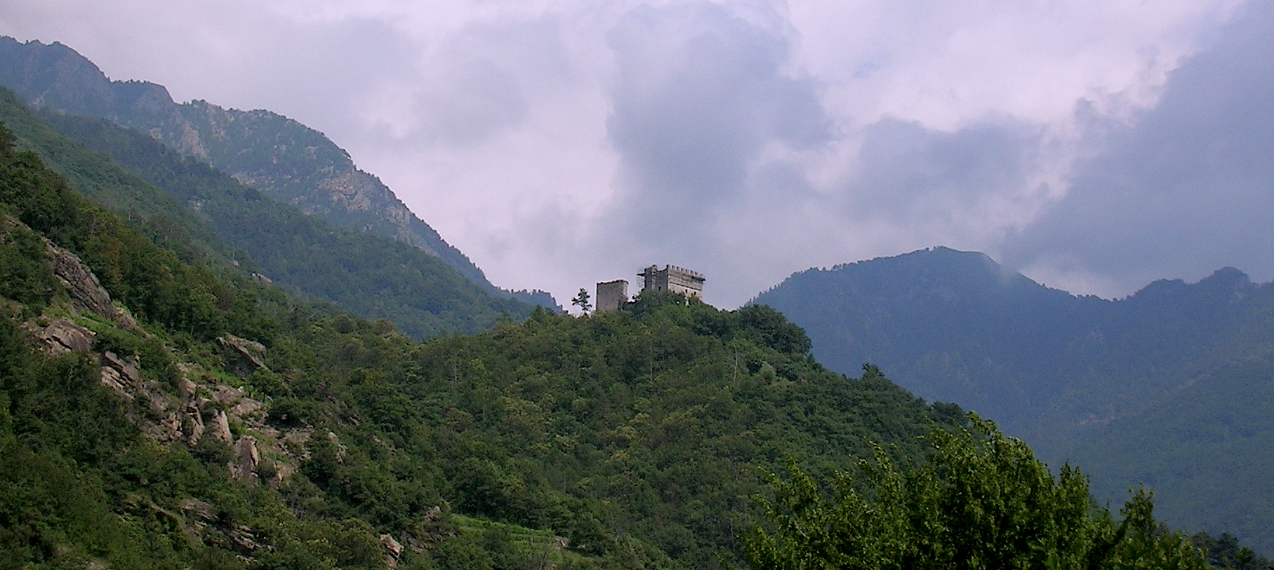 Castello superiore di Arnad. Arnad, Valle d'Aosta, Italia.